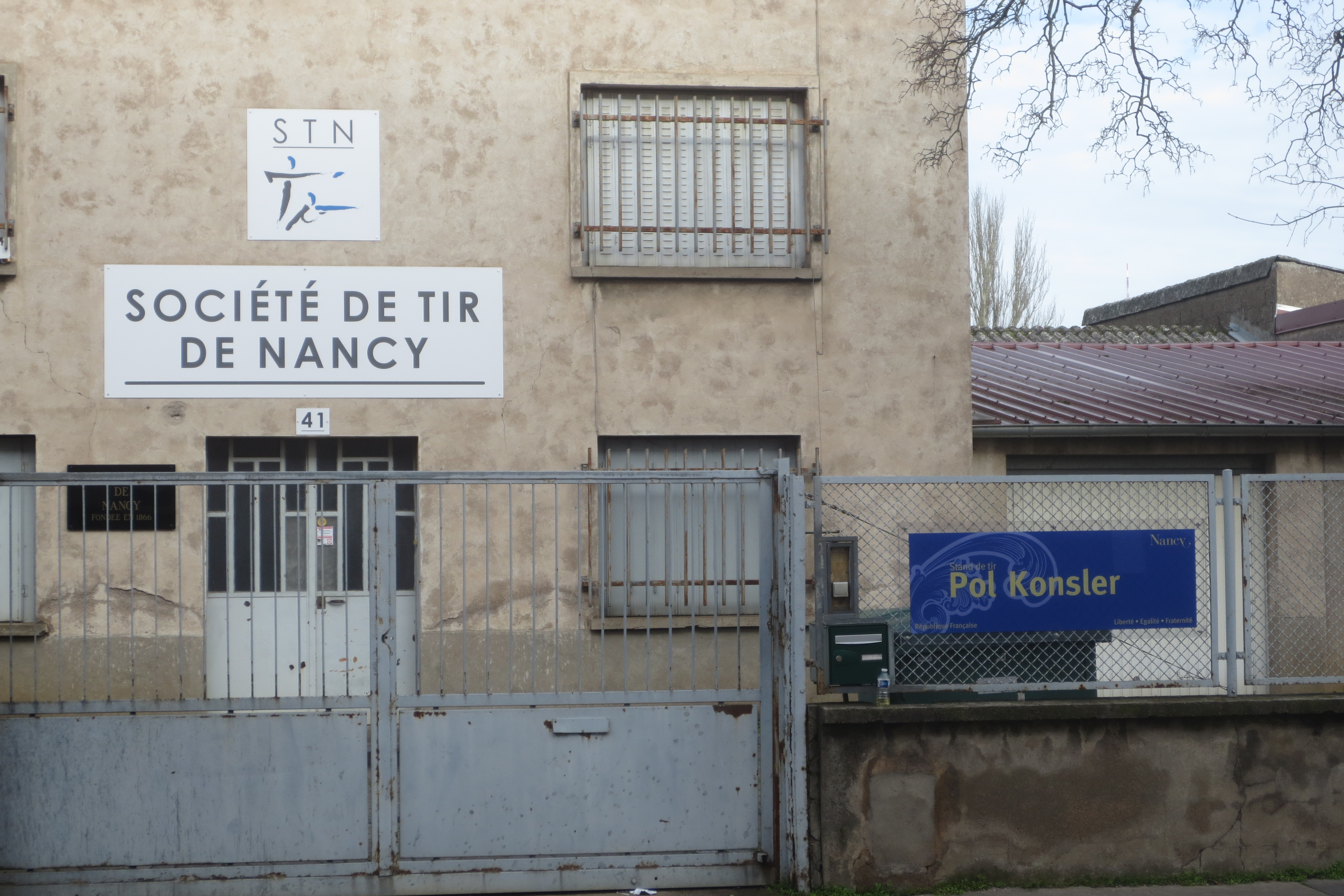 Société de Tir de Nancy - Façade rue de Tomblaine